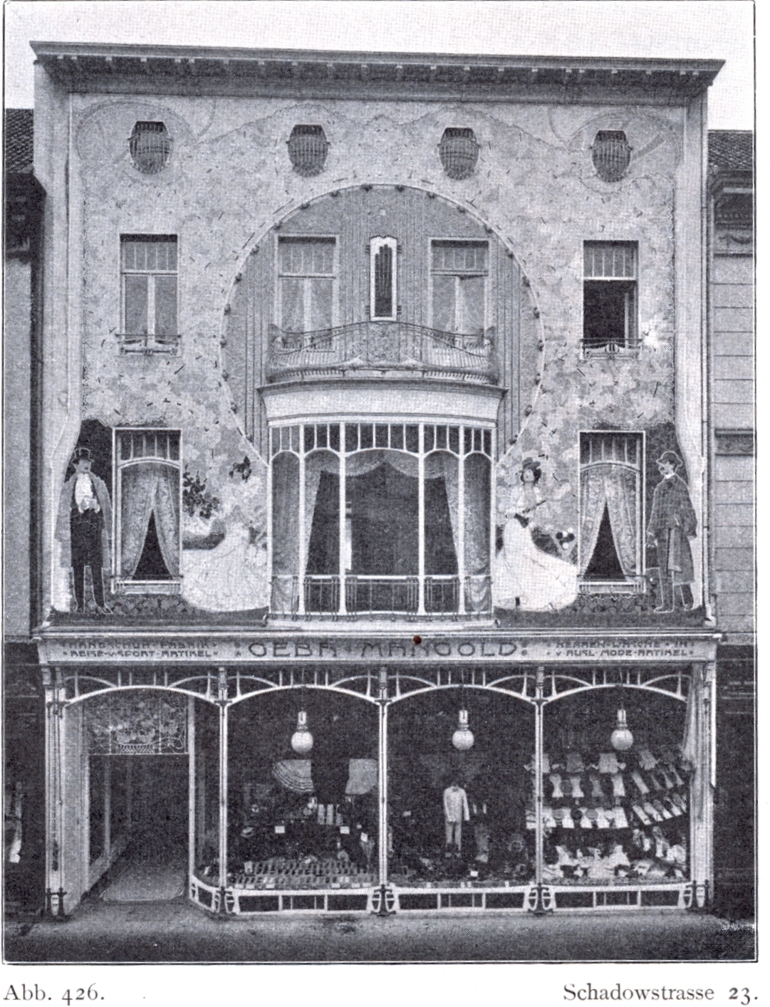 Haus in Düsseldorf, Schadowstr. 23, Architekt Gottfried Wehling Düsseldorf, Vorderansicht